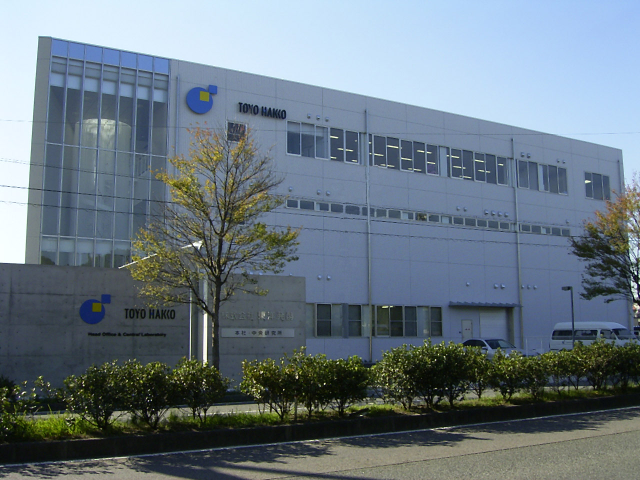 本社中央研究所